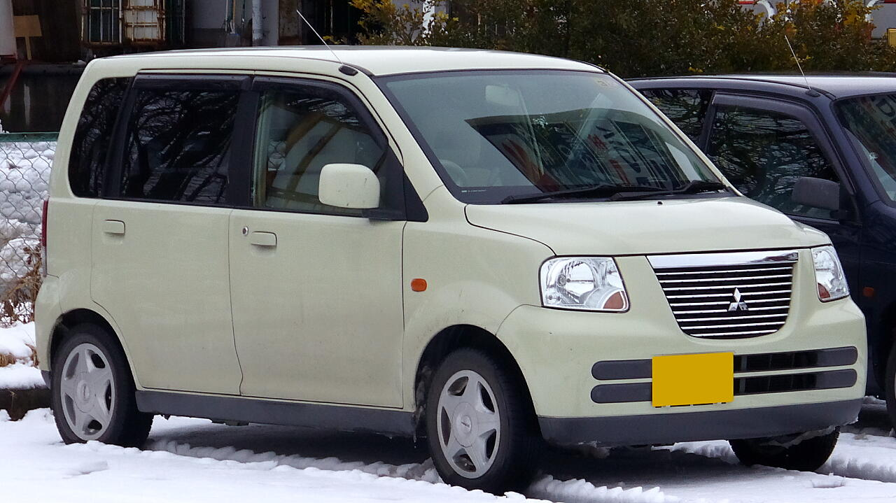 三菱・eKクラッシィ